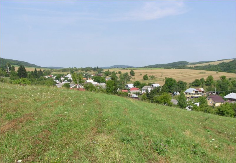 Celkový pohľad